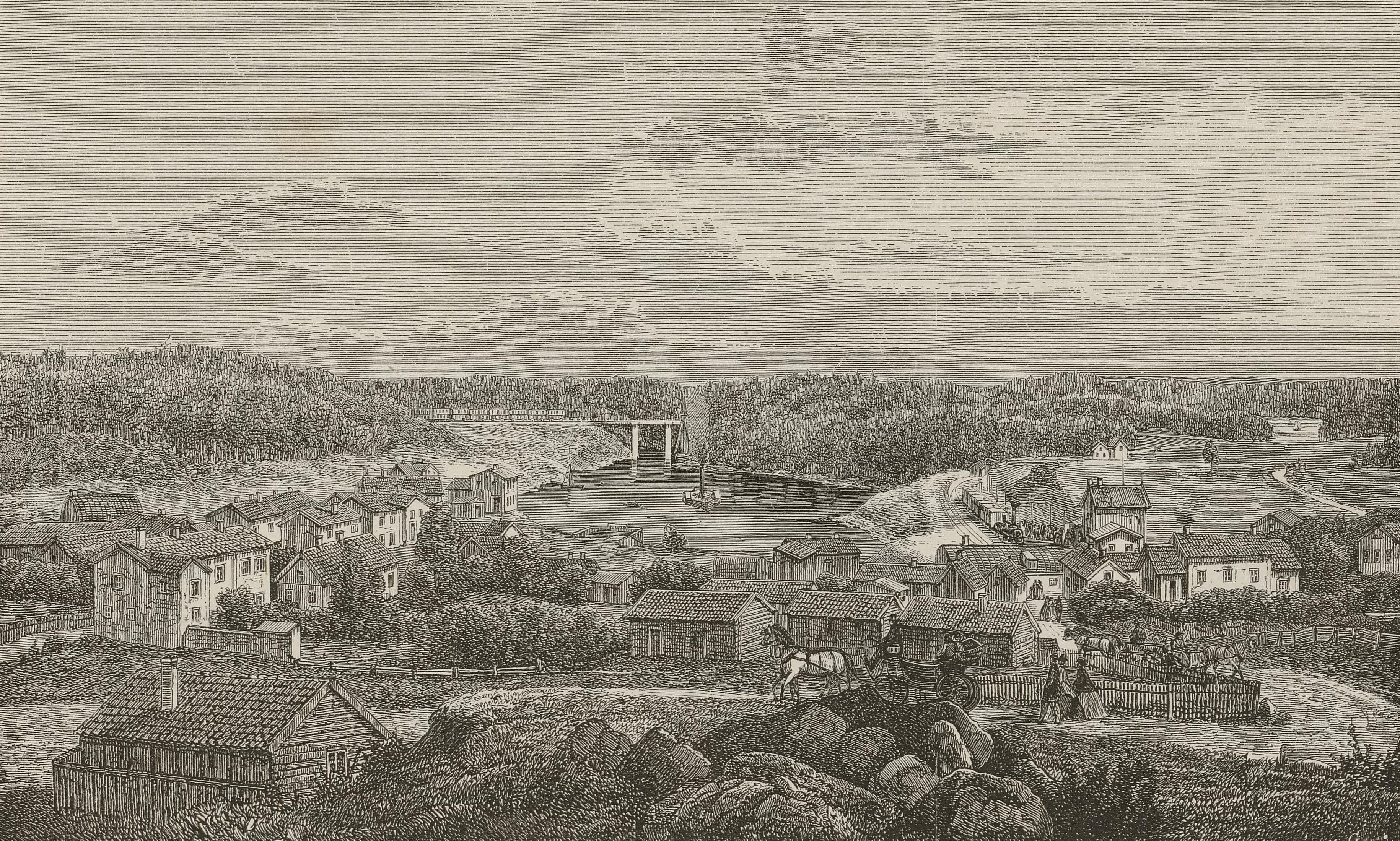 Illustrasjon hentet fra boken Nordiska taflor av ukjent forfatter og utgitt av Albert Bonnier (se, 1865)